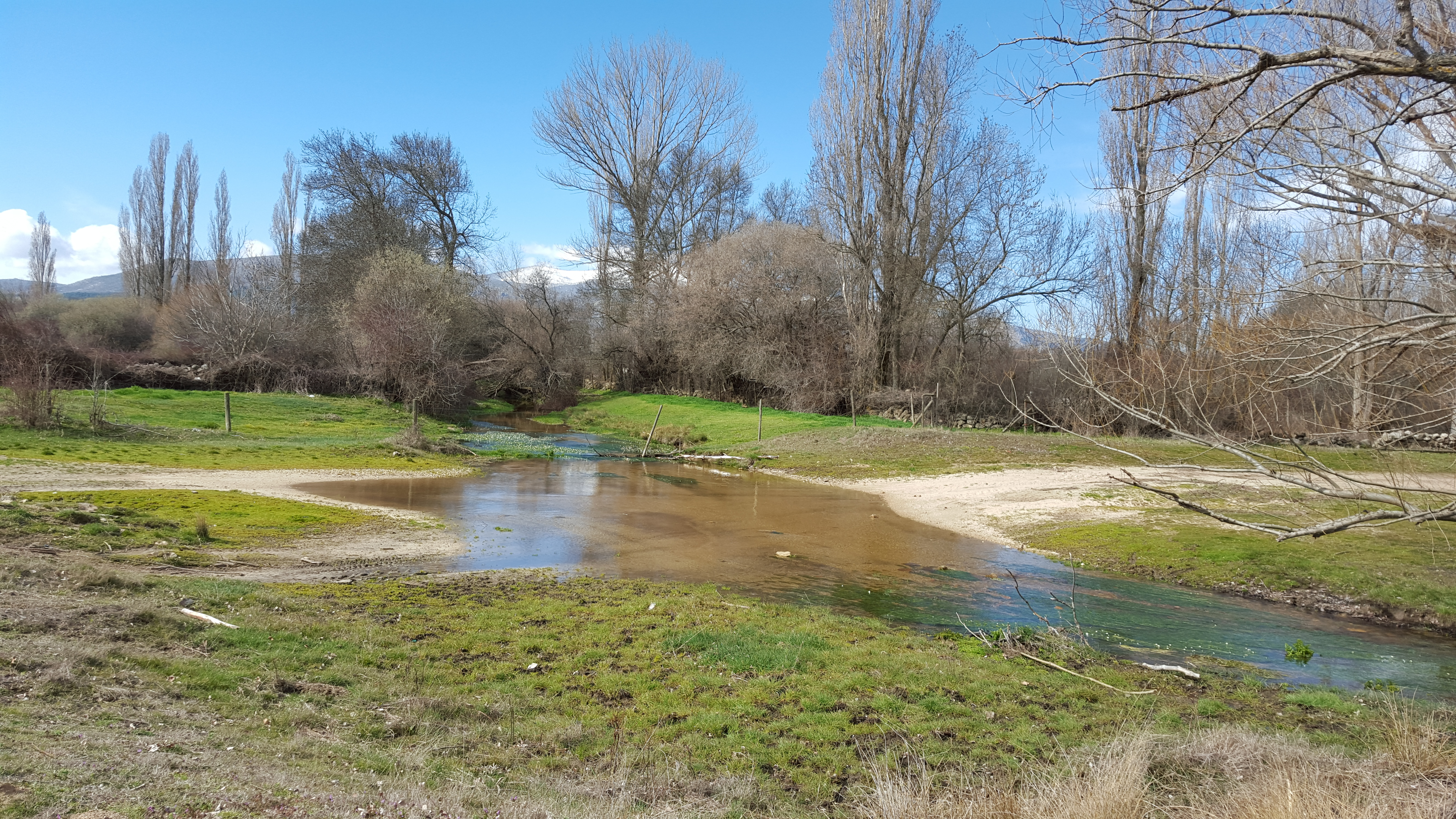 Río Ulaque, Aulaque, Ullaque o río de Narros en Blacha, afluente del río Adaja, Ávila, España This is a photography of a Site of Community Importance in Spain with the ID: ES4180081. Natura2000 entry, EEA entry